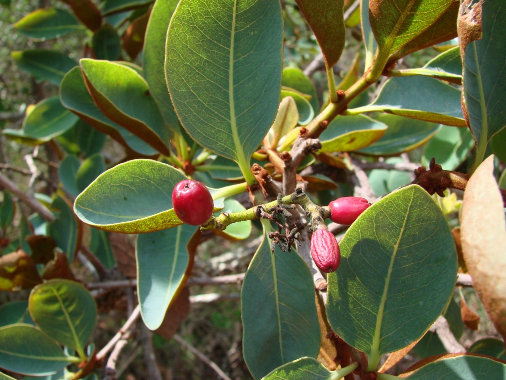 Guapira noxia - NYCTAGINACEAE Jardim Botânico de Brasília - Distrito Federal - Brasil.